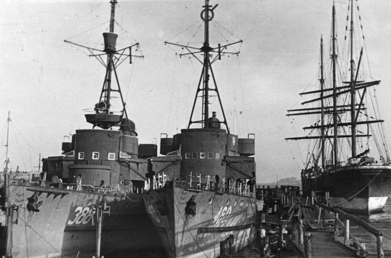 Kriegsschiffe werden zu Passagierdampfer: Vier ehemalige deutsche Minensuchboote wurden von der Kieler Reederei Paulsen & Ivers angekauft, um nach dem Umbau als Passagierdampfer in den Kiel-Korsör Verkehr eingestellt zu werden. Beim Umbau werden die Maschinen durch ehemalige Räumboot-Motoren ersetzt. Unser Bild zeigt die M-Boote an der Blücherbrücke in Kiel. Rechts das alte Segelvollschiff "Winterhude", das einer finnischen Reederei gehört und in den letzten Jahren als Wohnschiff für Seeleute diente. 3-2-49 Illus-dpd